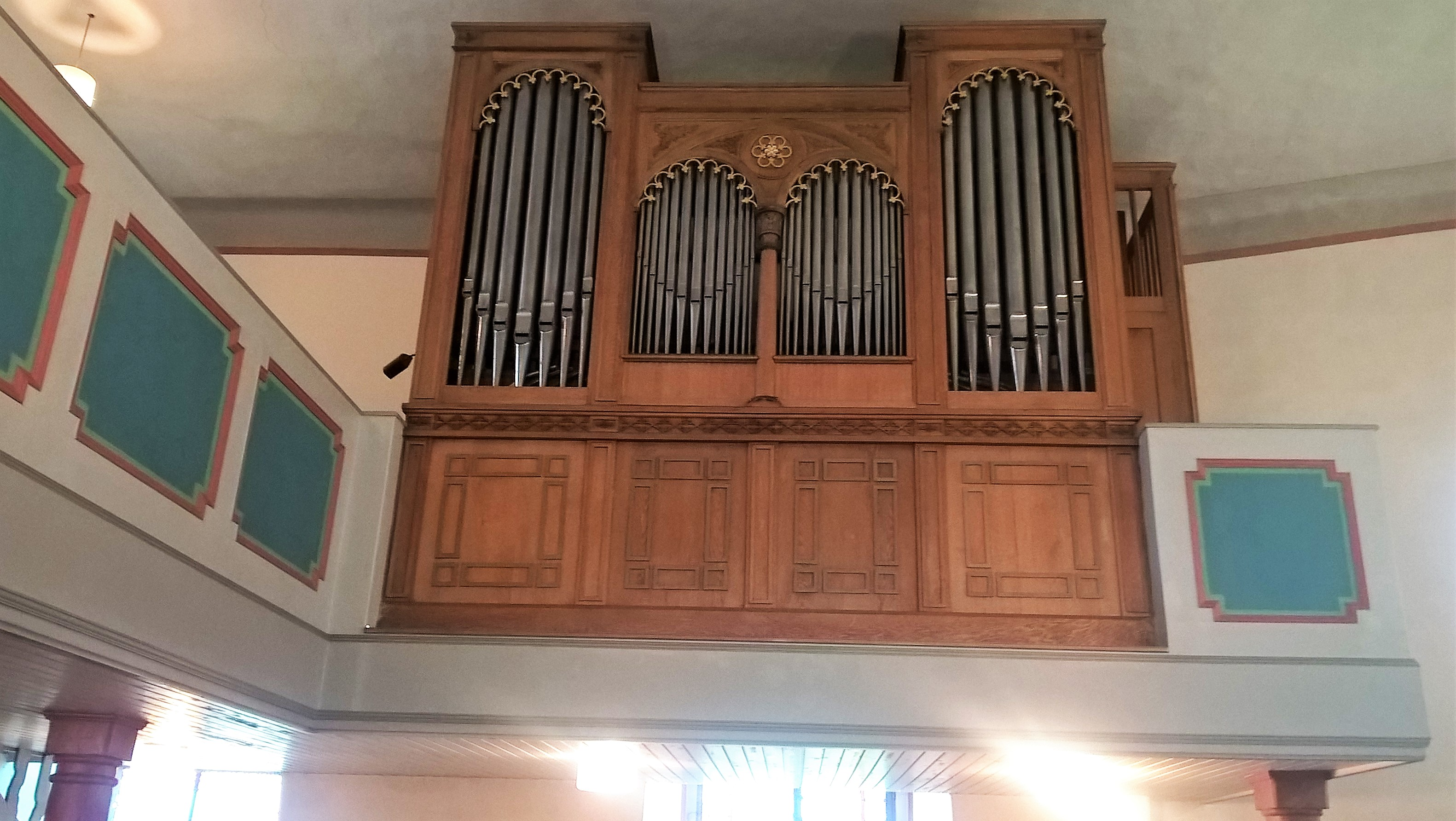 Evangelische Kirche Butzbach-Maibach, Wetteraukreis, Hessen, Deutschland